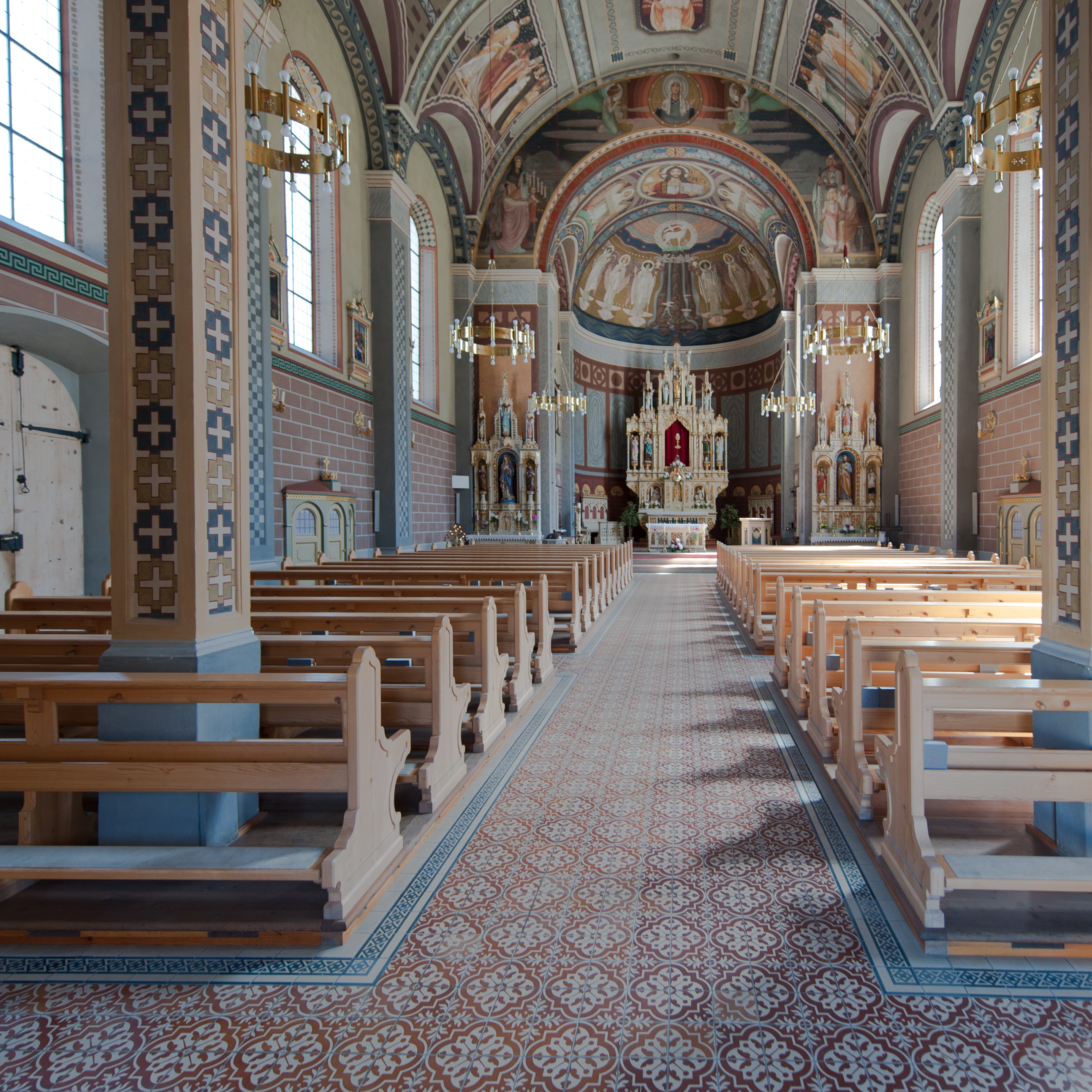 Wiki takes Nordtiroler Oberland: Kath. Pfarrkirche hl. Leonard in Mairhof und Friedhof